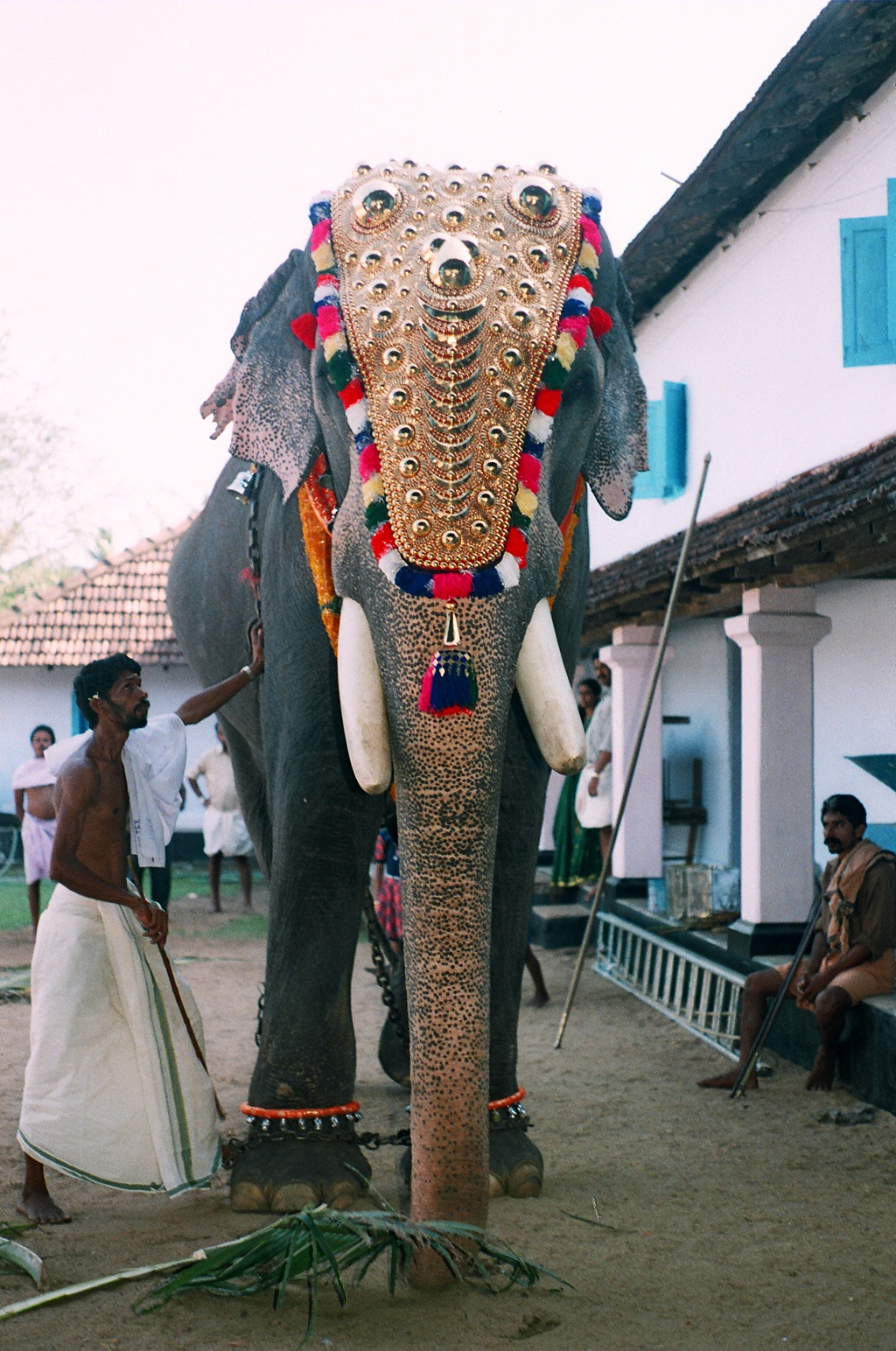 ഗുരുവായൂർ പത്മനാഭൻ (Guruvayoor padmanaban)